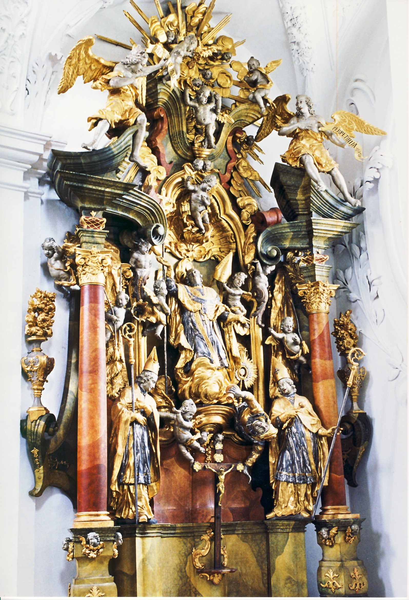 Magnus Anton Stapf aus Pfronten, Altar in Obermarchtal